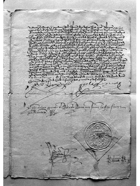 A PAGE OF THE ORIGINAL EDICT SIGNED BY KING FERDINAND OF ARAGON AND QUEEN ISABELLA OF CASTILE (1492). Courtesy of Junta de Castilla Leon, Consejeria de Cultura y Turismo, Archivo Historico Provincial.